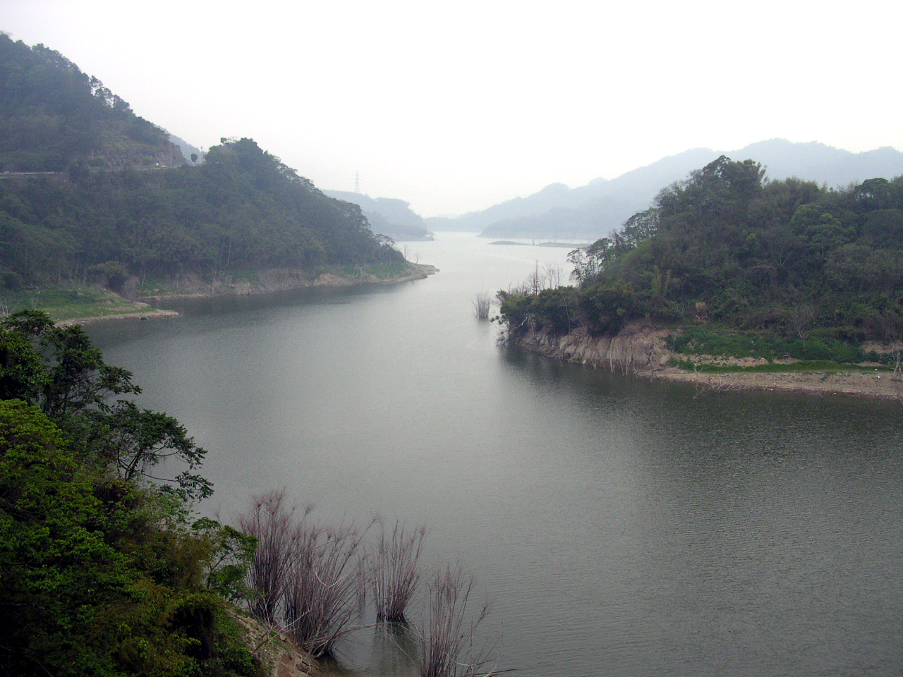 中文（台灣）: 鯉魚潭水庫水體。